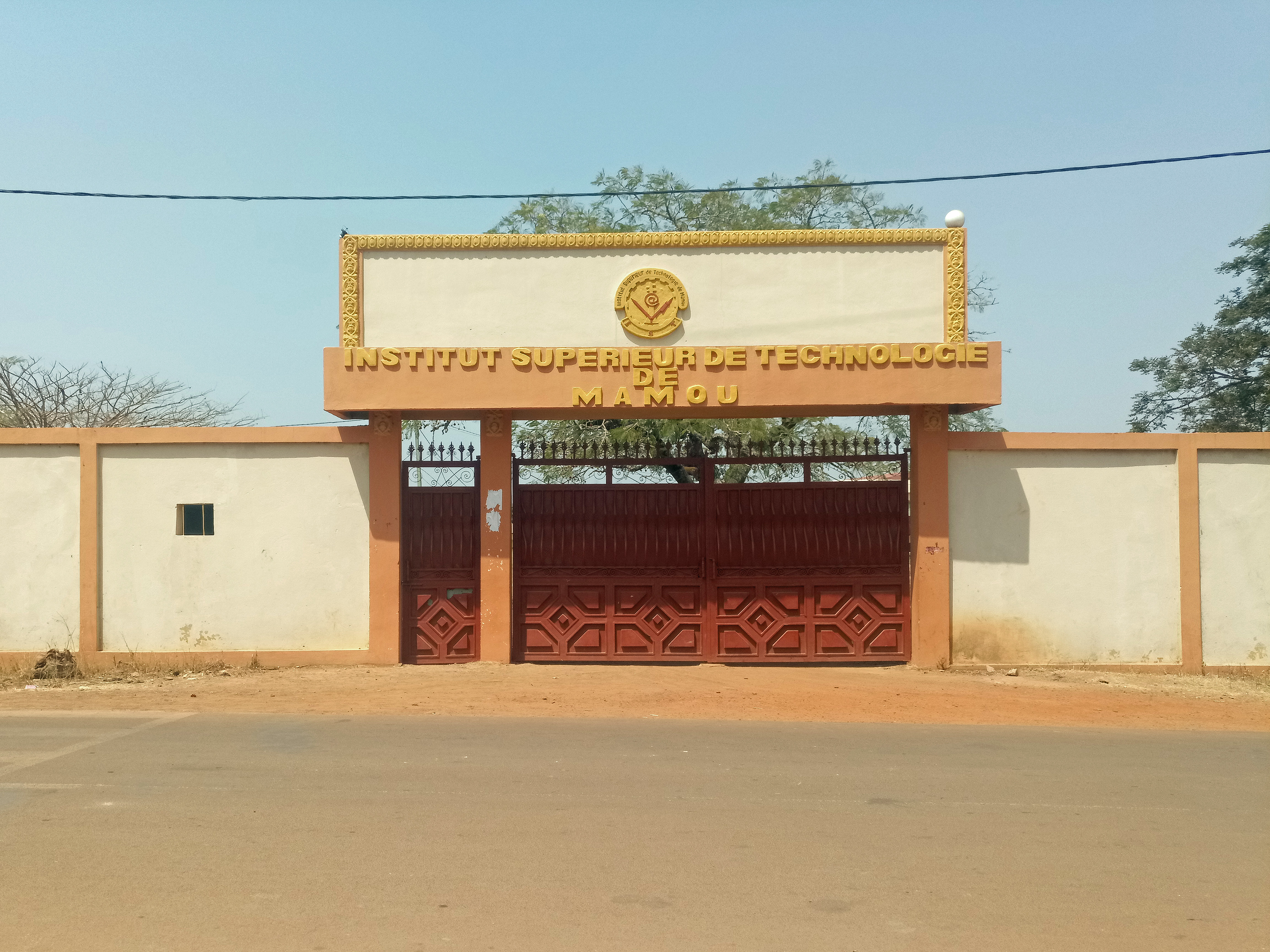 La rentré de l'institut de Mamou